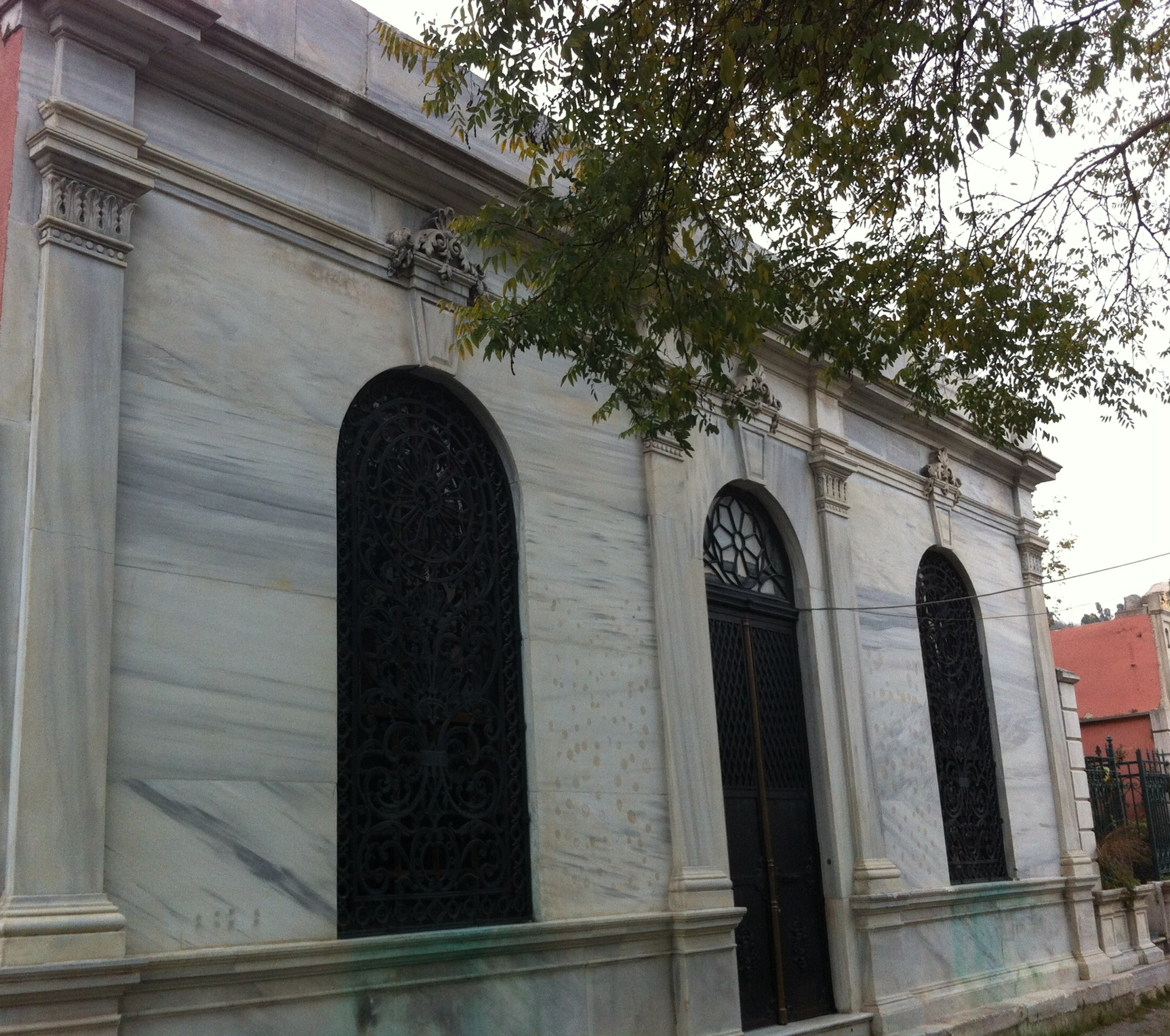 Bozcaadalı Hasan Hüsnü Paşa Türbesi. Eyüp